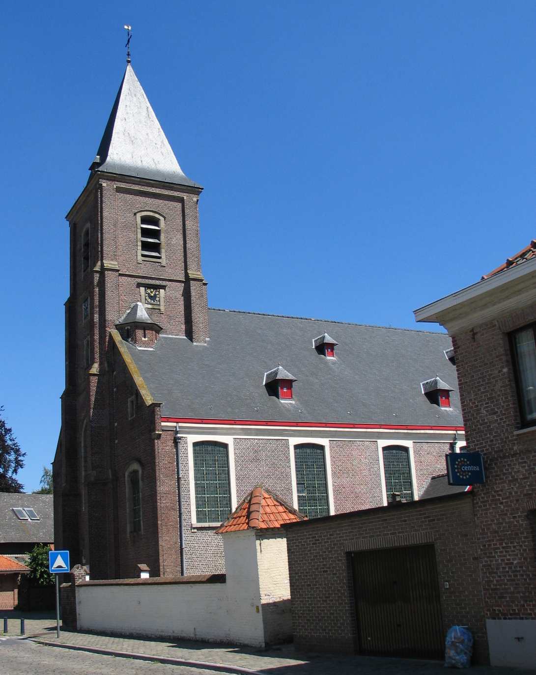 Zwijnaarde Sint-Niklaaskerk 24-7-2008 12-50-50